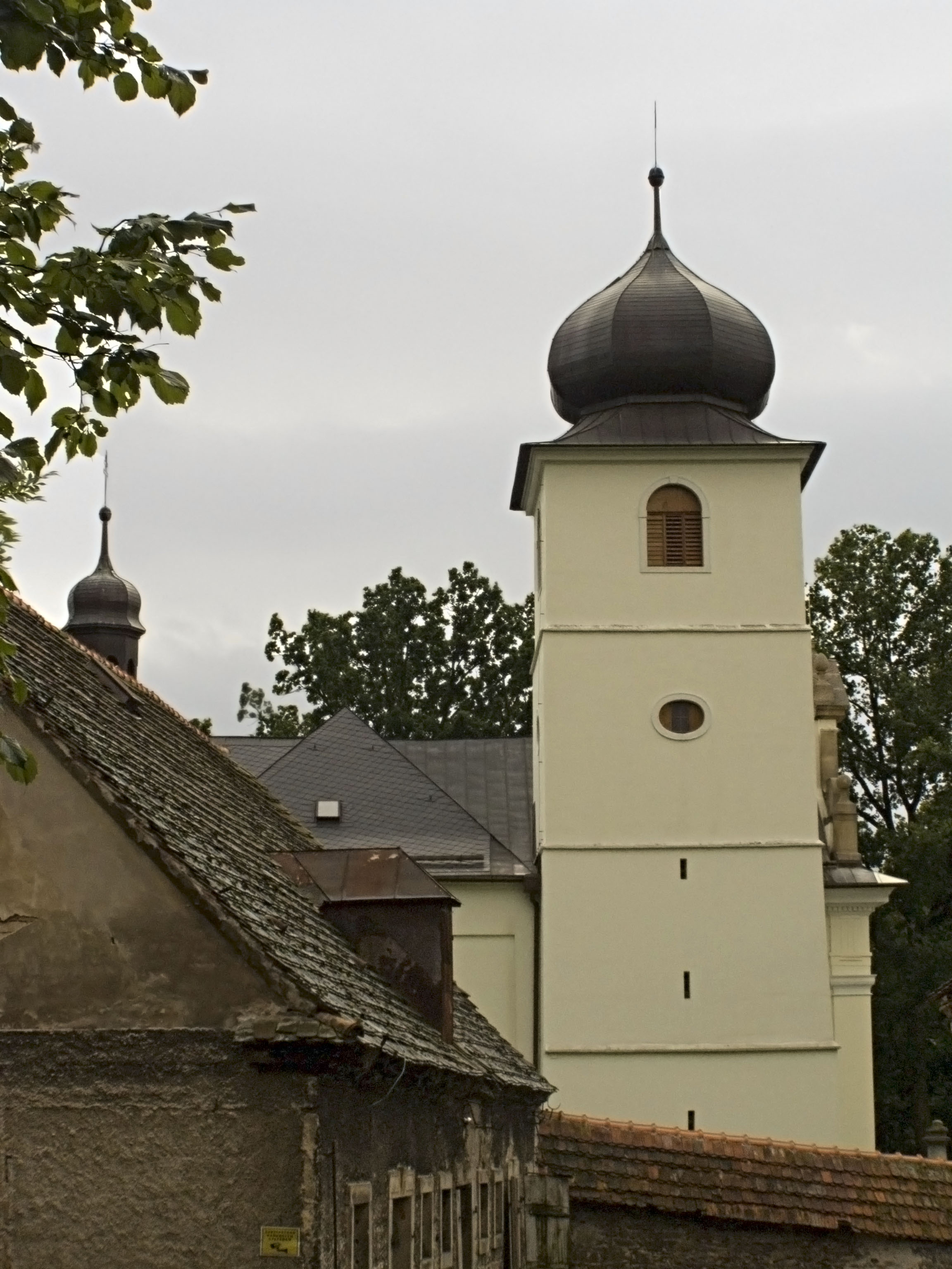 Martínkovice, Kostel svatého Jiří a svatého Martina